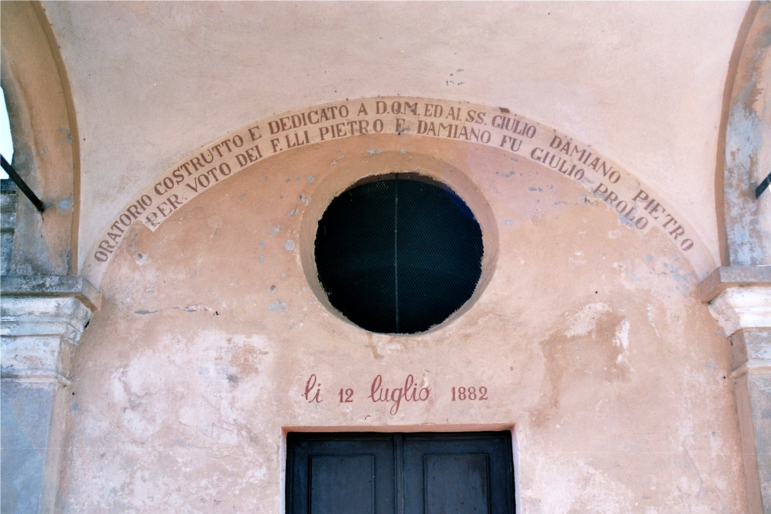 Fara Novarese (NO), Oratorio di San Giulio, dedicazione.